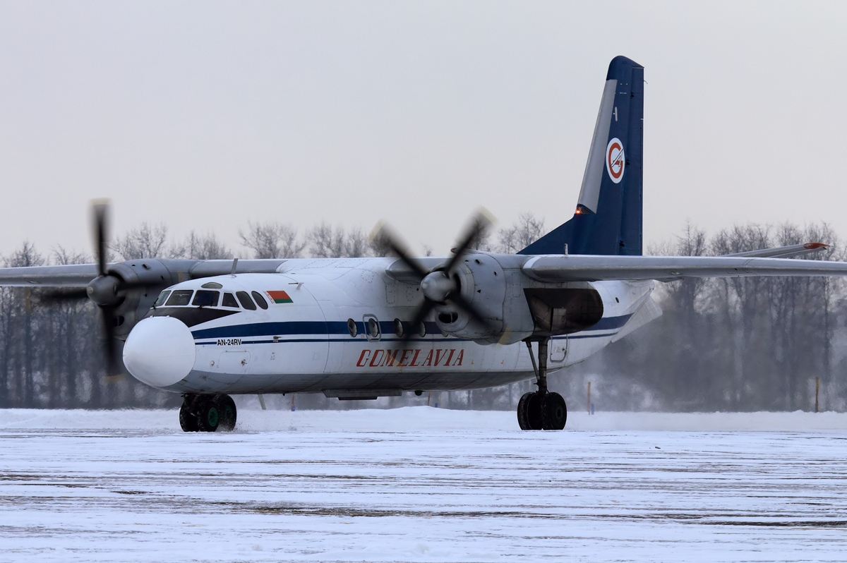 Gomelavia Antonov An-24RV